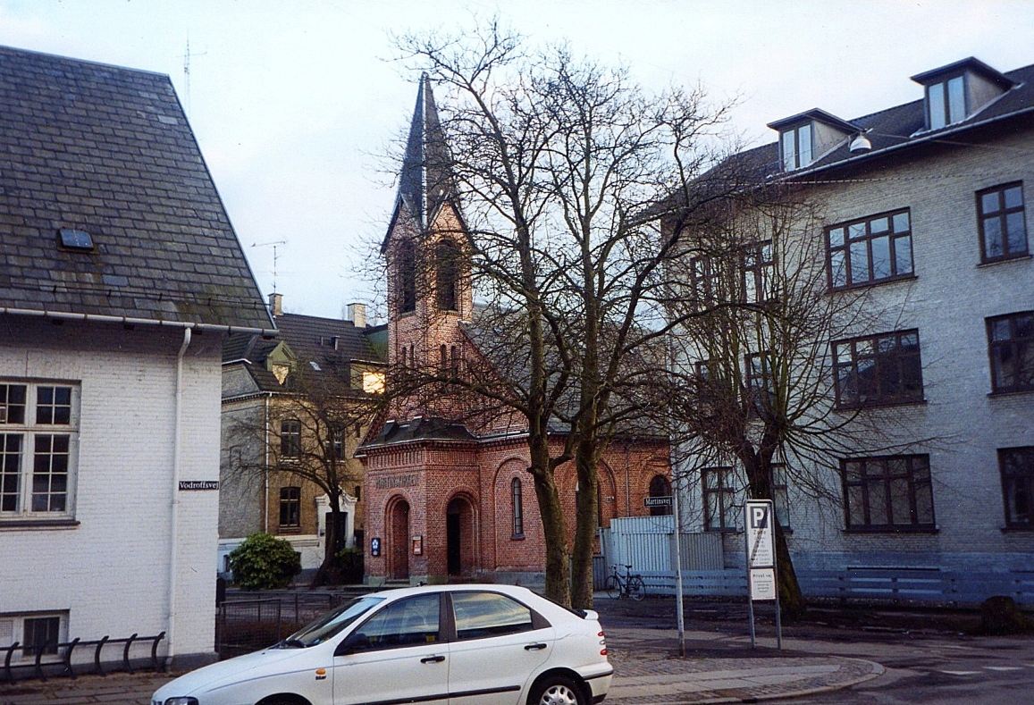 Martinskirken (evangelisk luthersk frikirke), Fredriksberg Kommune